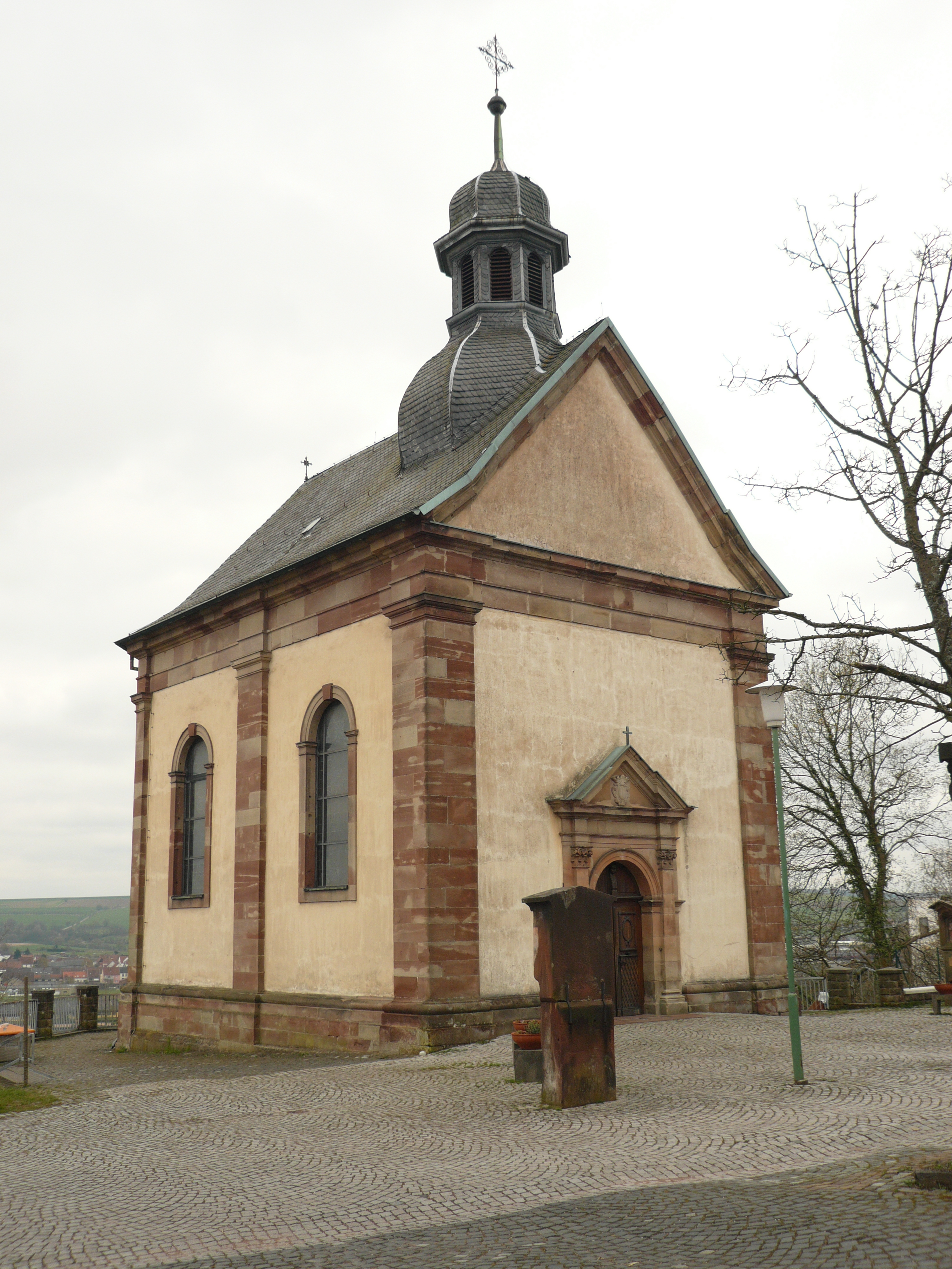 Chapel Heilig-Kreuz-Kapelle in Blieskastel